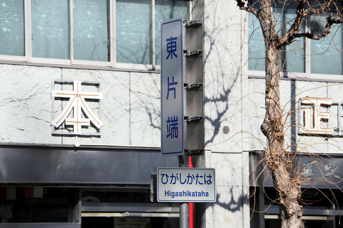 東片端交差点（日本国愛知県名古屋市東区）にて